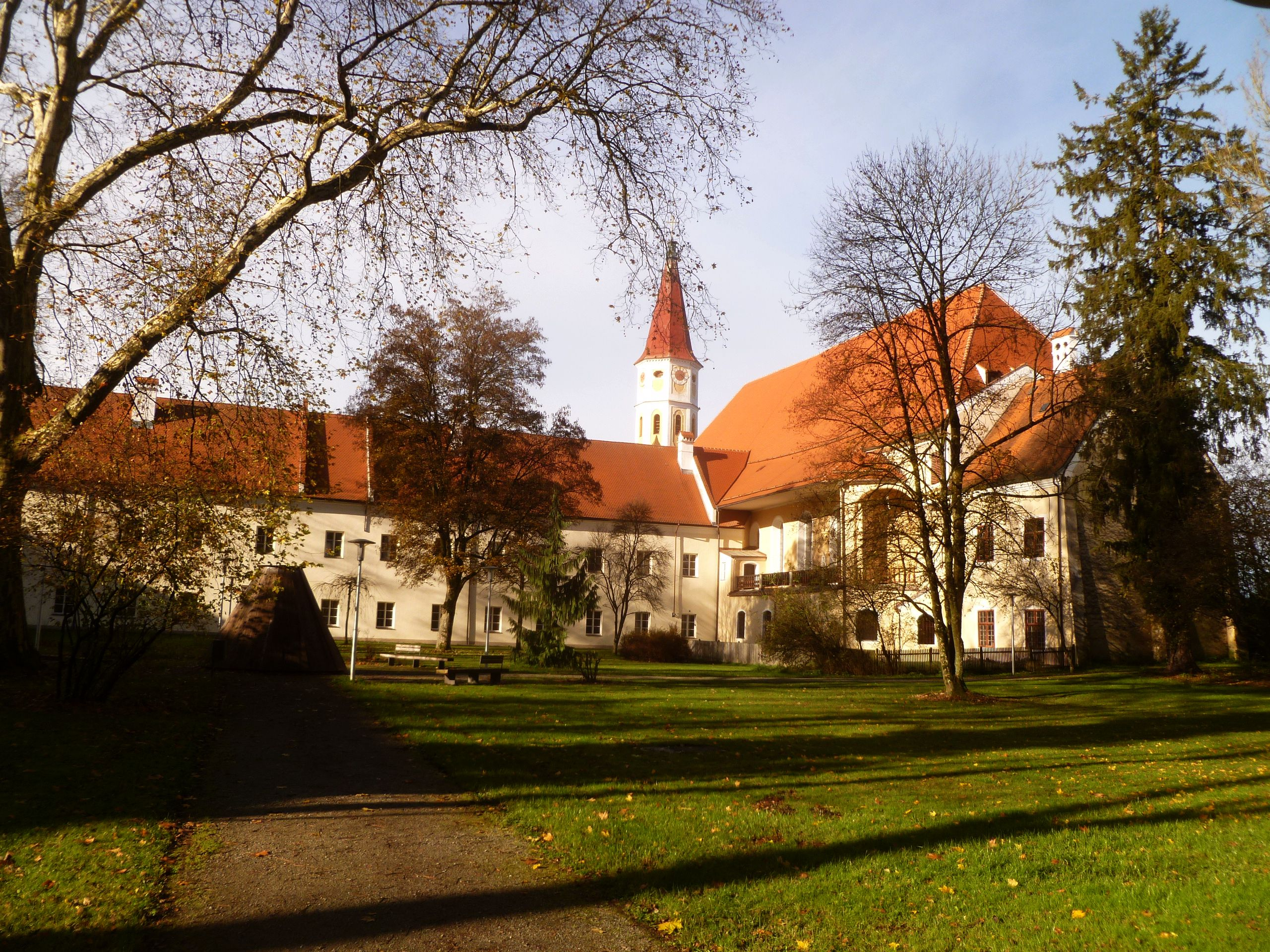 Gesamtanlage des ehem. Augustiner-Chorherrenklosters Ranshofen: Pfarrkirche (Stiftskirche), "Schlössl" (Klostertrakte), Meierhof, Friedhof mit Karner, Einfriedungsmauern mit Portalanlagen, Gartenbaudenkmale im ehem. Konventgarten; Reste von Vorgängerbauten